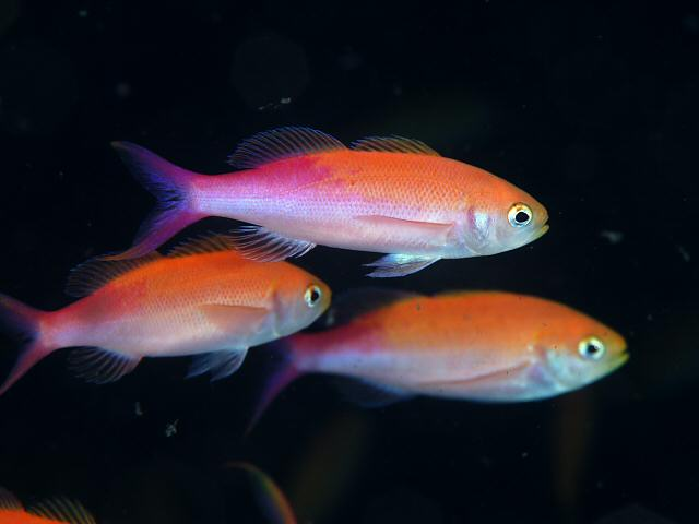 ミナミハナダイ Luzonichthys waitei